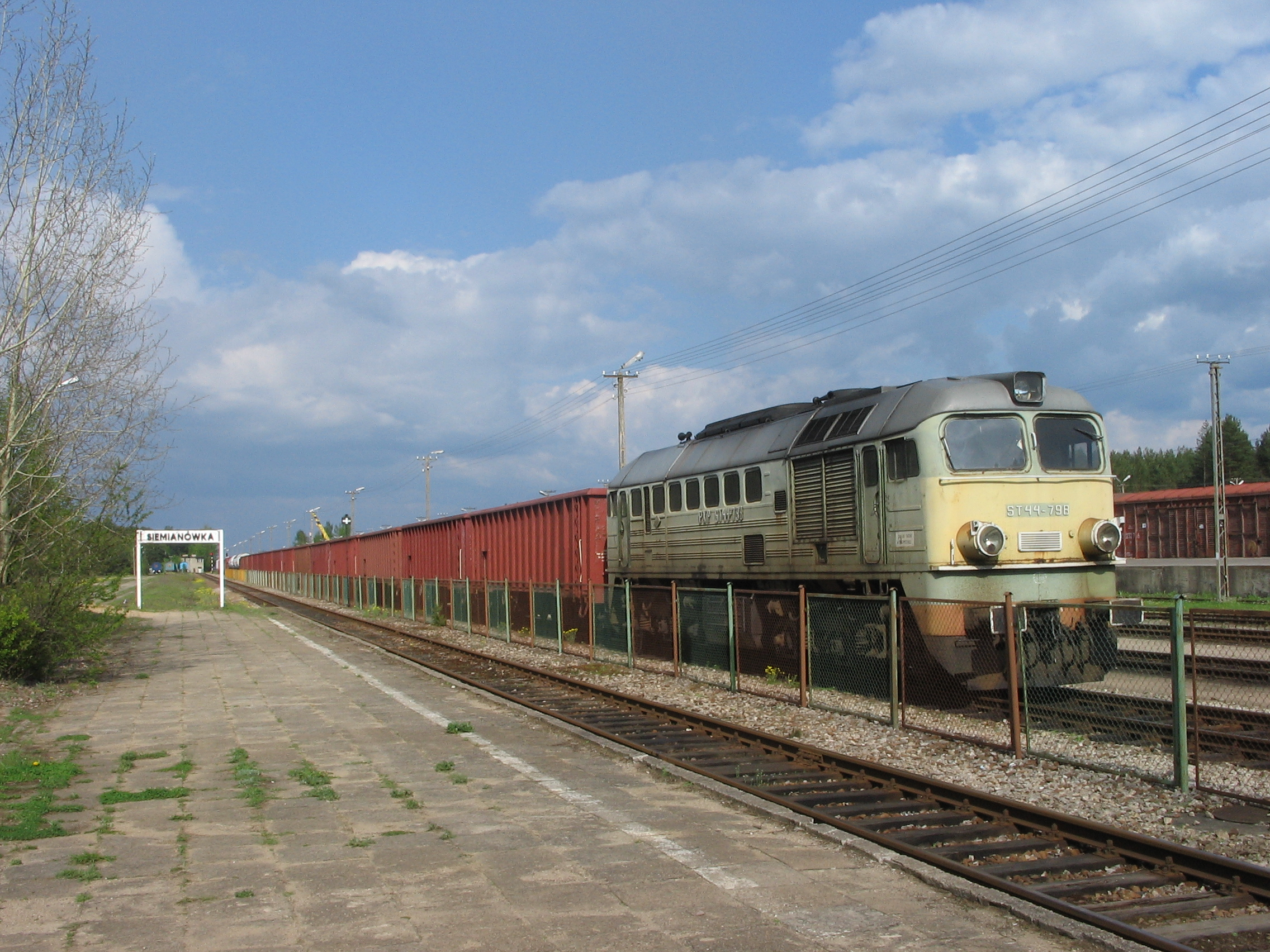 Stacja Siemianówka - peron oraz lokomotywa ST44-798 z pociągiem